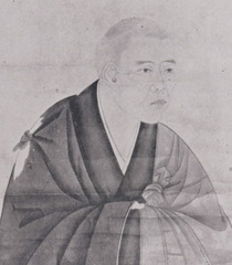 明兆の自画像